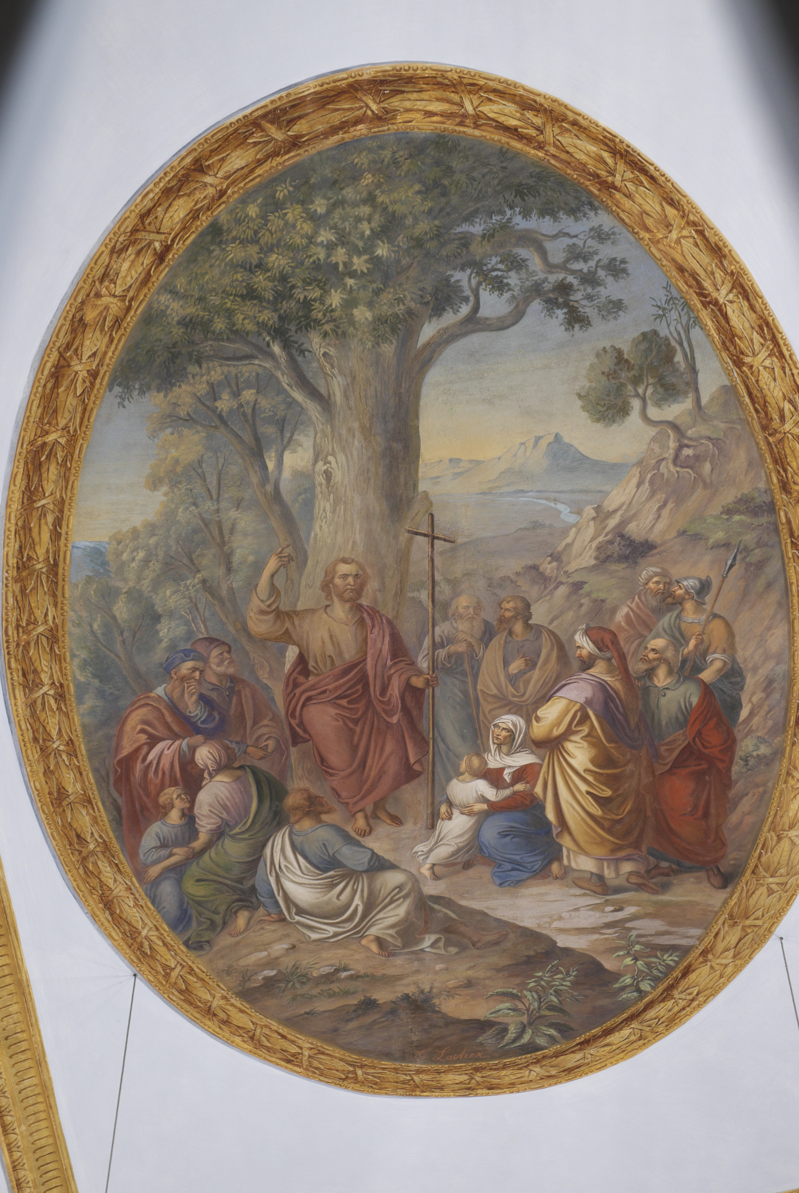 Katholische Pfarrkirche St. Johannes Baptist in Schöngeising im Landkreis Fürstenfeldbruck (Bayern/Deutschland), Deckenmalerei von Georg Lacher, von 1861; Darstellung: Predigt des Johannes des Täufers